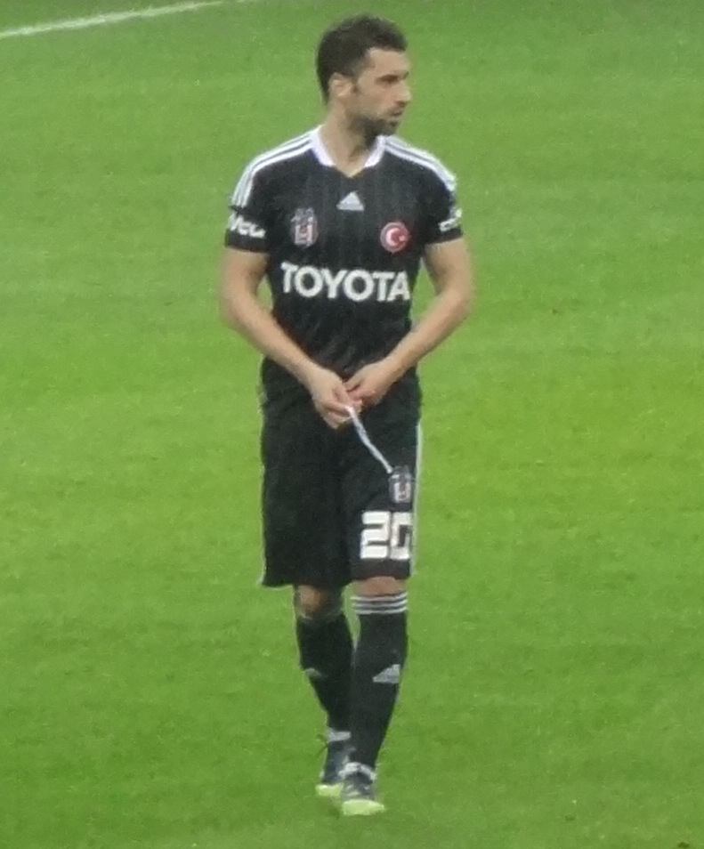 Simao Beşiktaş formasıyla GS derbisinde